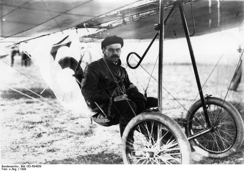 Hans Grade in seinem Eindecker Der alte Pionier der Fliegerei, Meister Hans Grade in seinem alten Grade-Eindecker bei seinem ersten Fluge in Bork i.d. Mark, 1909 Abgebildete Personen: Grade, Hans: Flugpionier, Deutschland (PND 119051222)